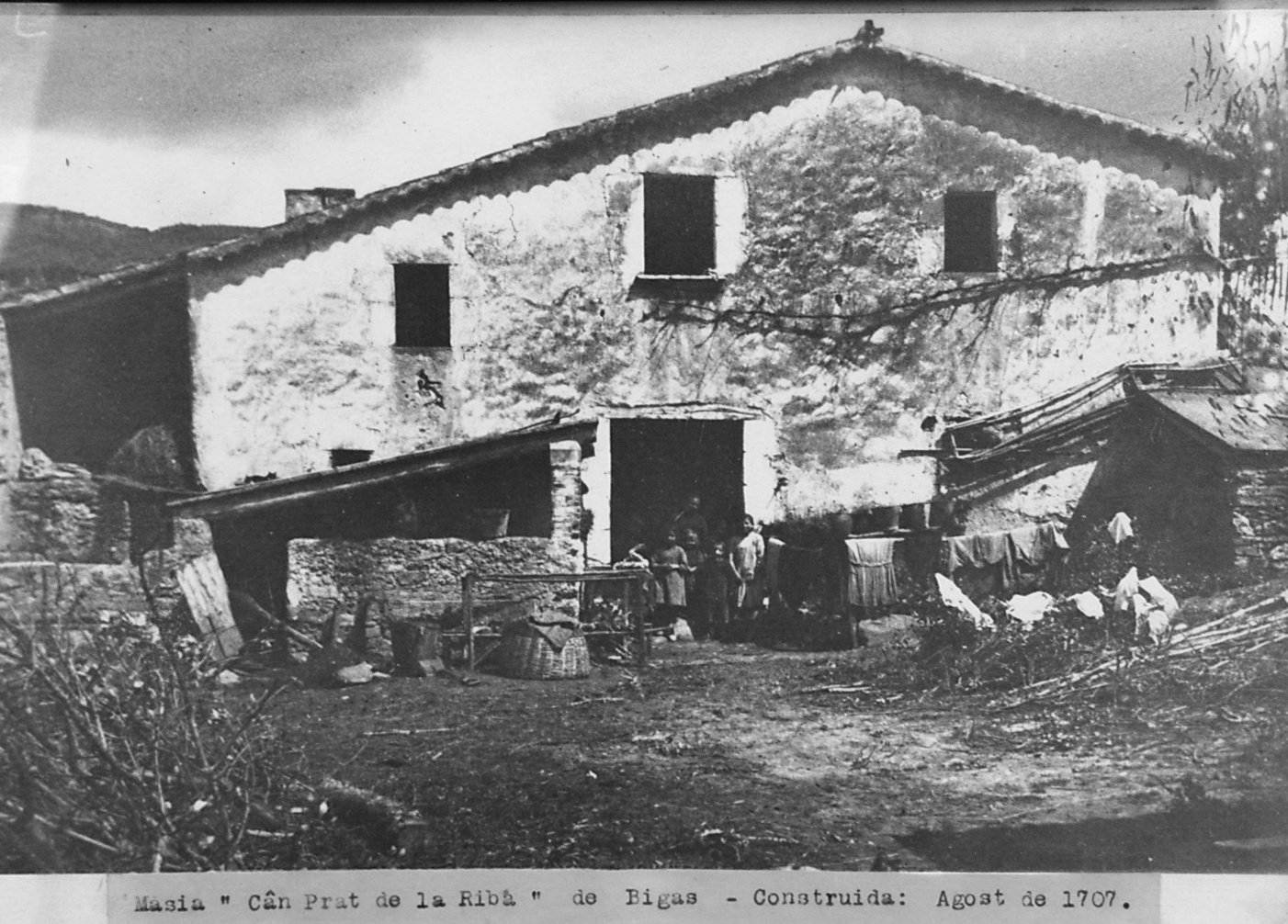 Can Prat de la Riba (Bigues i Riells, Vallès Oriental). La imatge recull la forma de la masia abans de ser modificada a finals del segle XX.